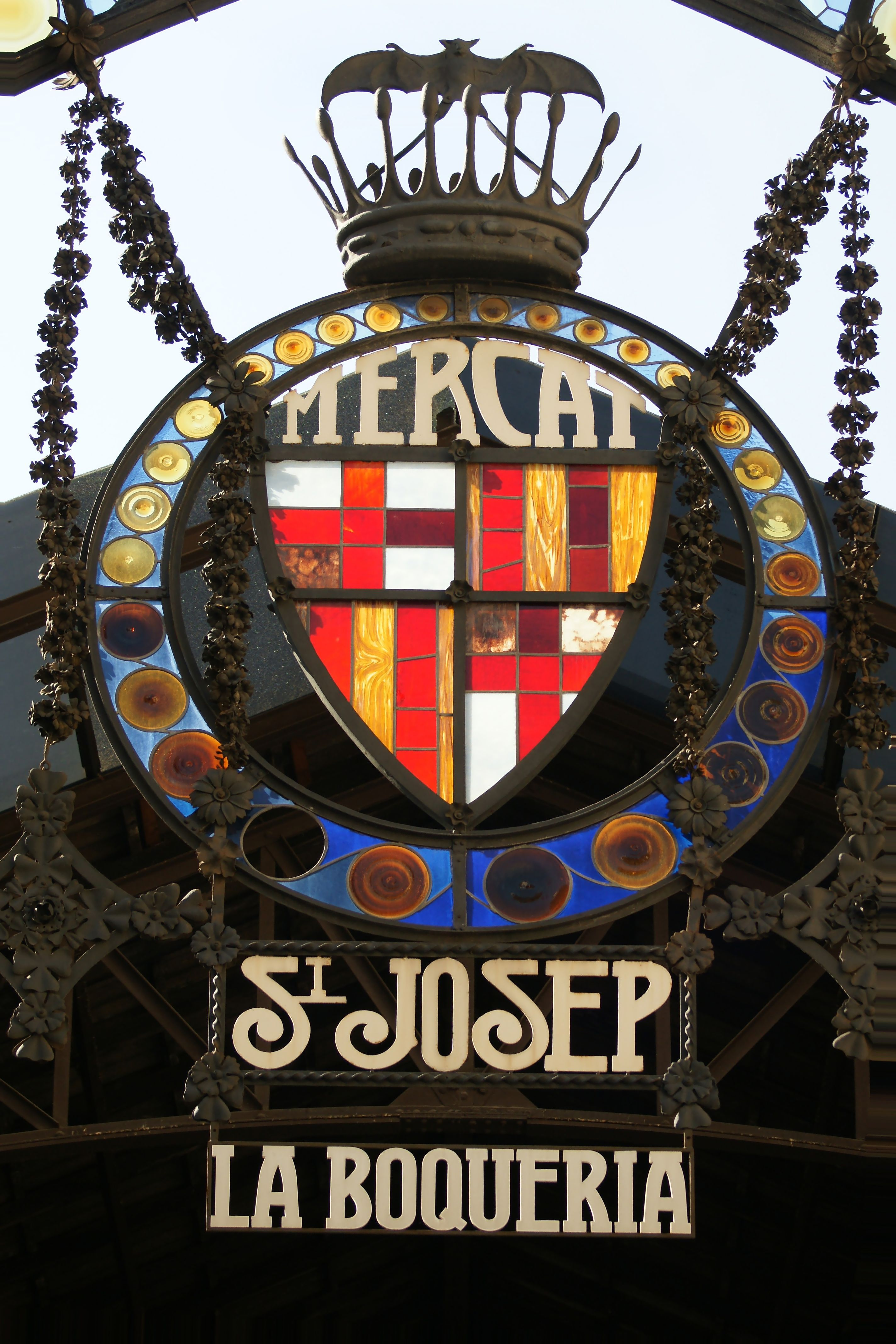 Die Markthallen des Mercat de la Boqueria liegen an der Straße La Rambla in Barcelona, Spanien und haben eine Fläche von 2.583 m².